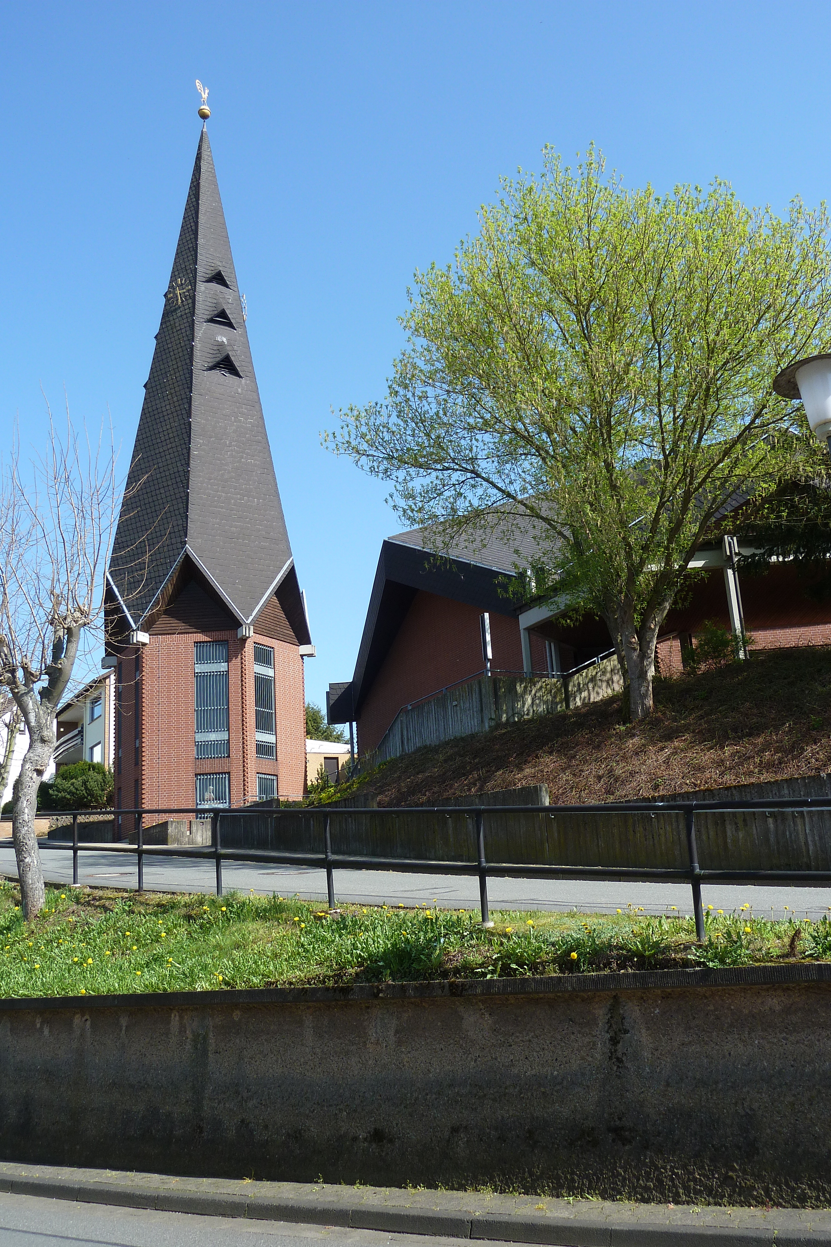 Katholische Kirche St. Sebastian in Rhumspringe, Eichsfeld. Erbaut 1977